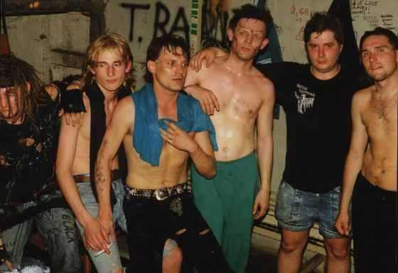 A Vágtázó Halottkémek tagjai: Balatoni Endre (Boli), Sidoó Attila (Kisfidó), Soós Lajos (Szónusz), Grandpierre Atilla, Ipacs László, Németh László (Fritz). Koppenhága.